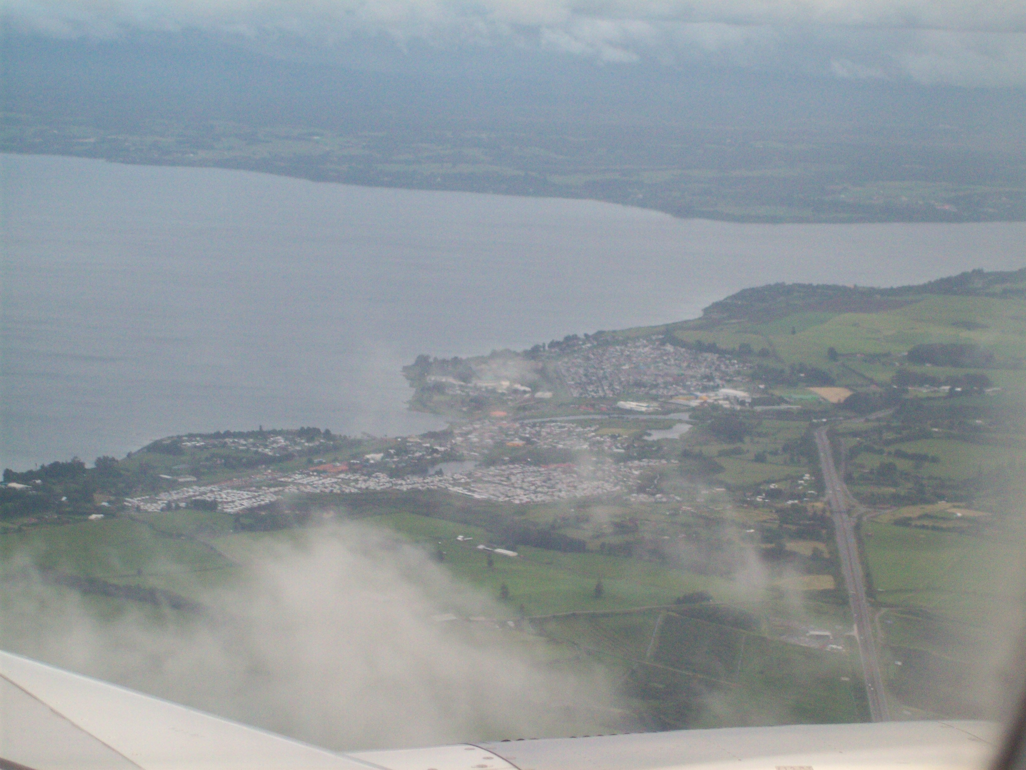 Llanquihue desde vuelo comercial